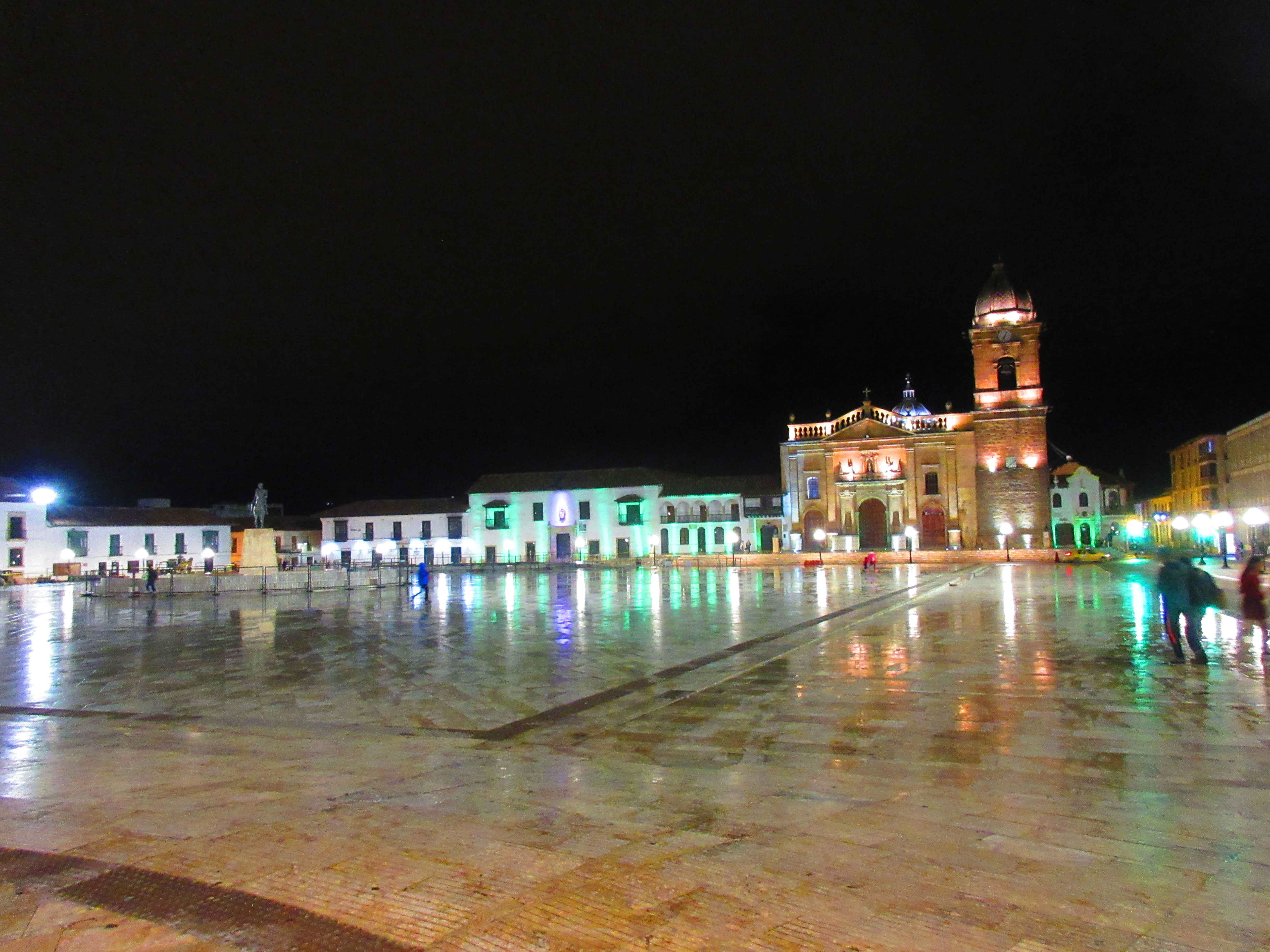 Vista nocturna de la Catedral de Tunja (Boyacá)